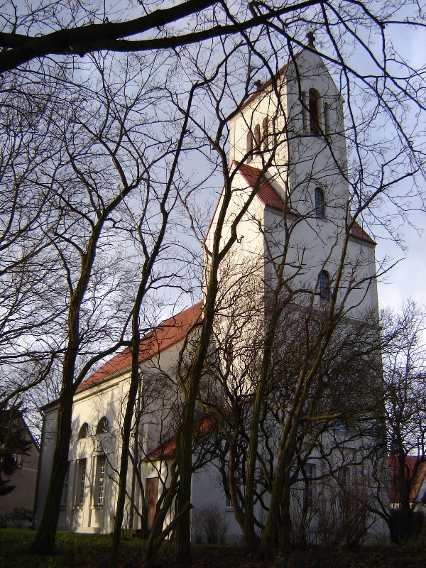 Kirche in Magdeburg-Randau